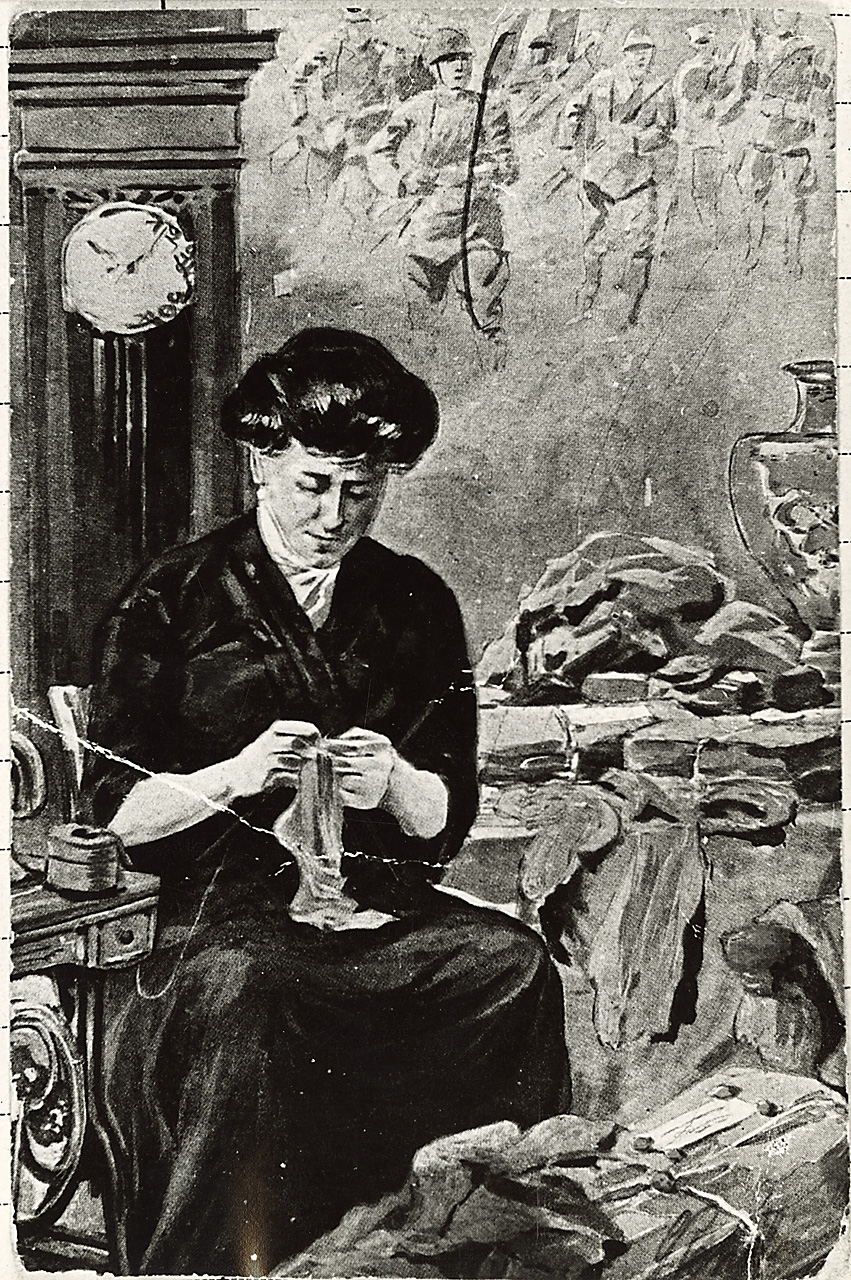 Poster con disegno di donna che cuce per i militari - sullo sfondo